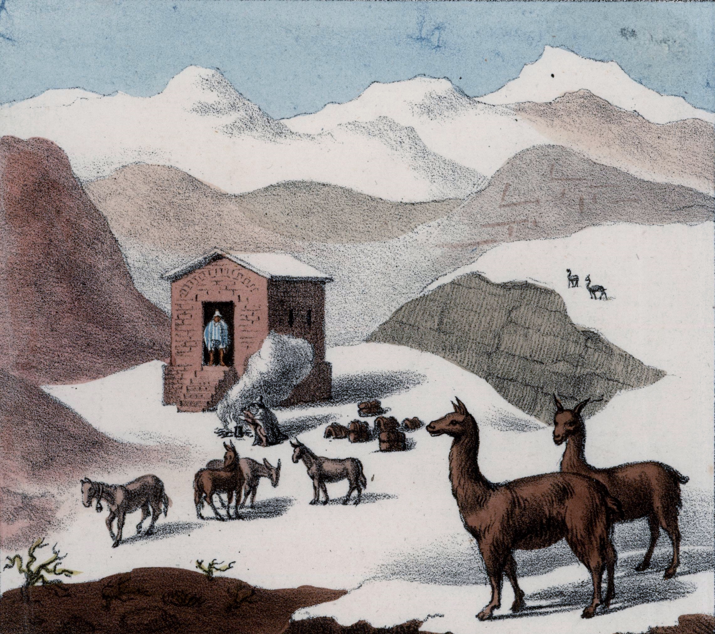 Vista de una cabaña en las montañas con nieve y guanacos en Las Cuevas. Litografía coloreada de George Johann Scharf en una página plegable con otros 3 grabados, según diversos bocetos (no se especifica quiénes son los autores de esos bocetos); impresa por Rowney & Forster y publicada por Peter Schmidtmeyer en su libro Travels into Chile, over the Andes, in the years 1820 and 1821, London: Longman, Hurst, Rees, Orme, Brown and Green, 1824.